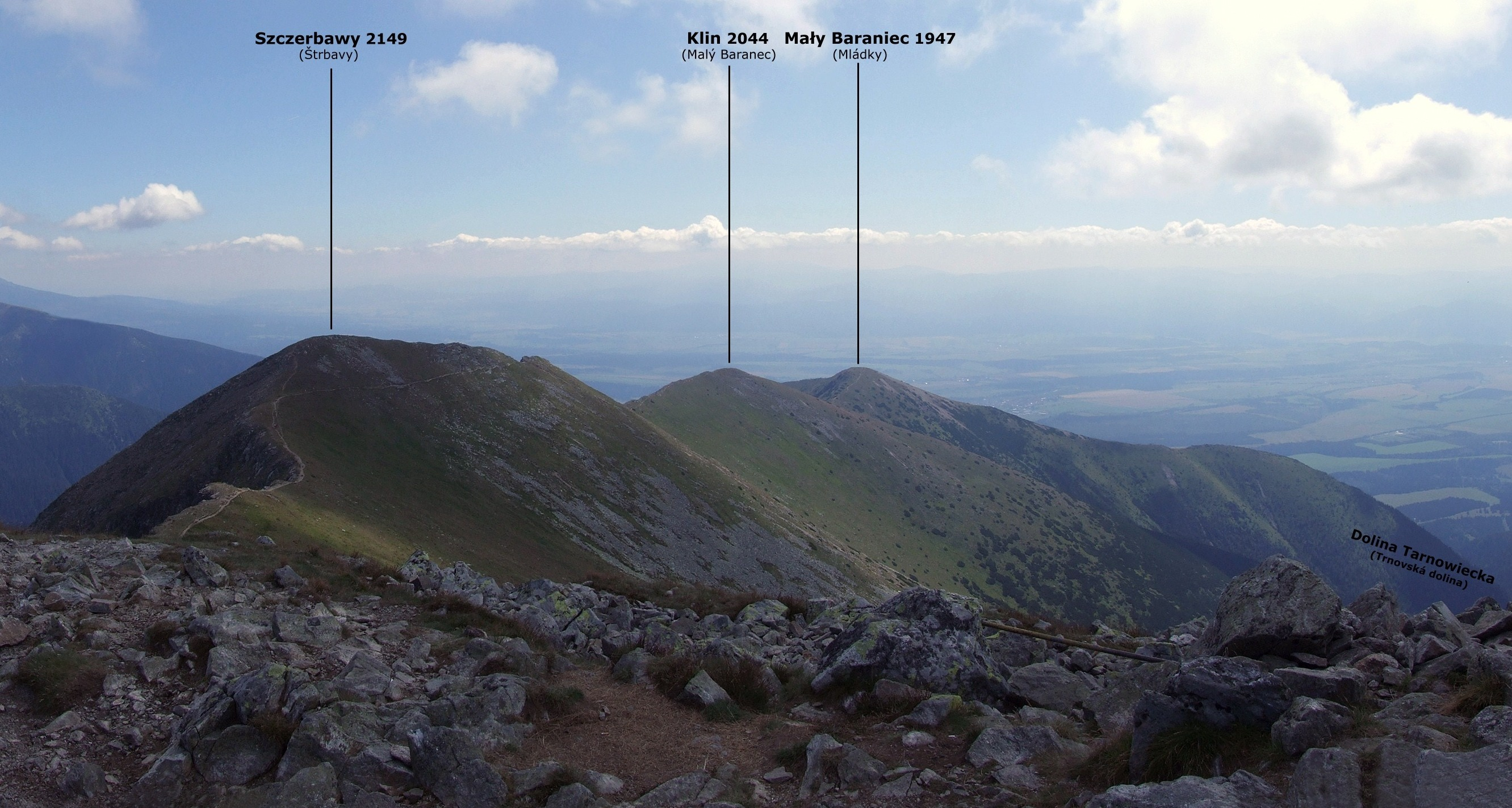 Wschodnia grań Barańców, widok z Barańca